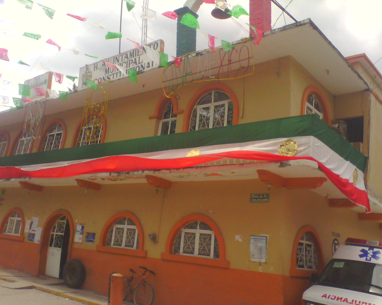 El Palacio Municipal de Mártir de Cuilapan durante las Fiestas Patrias de 2012